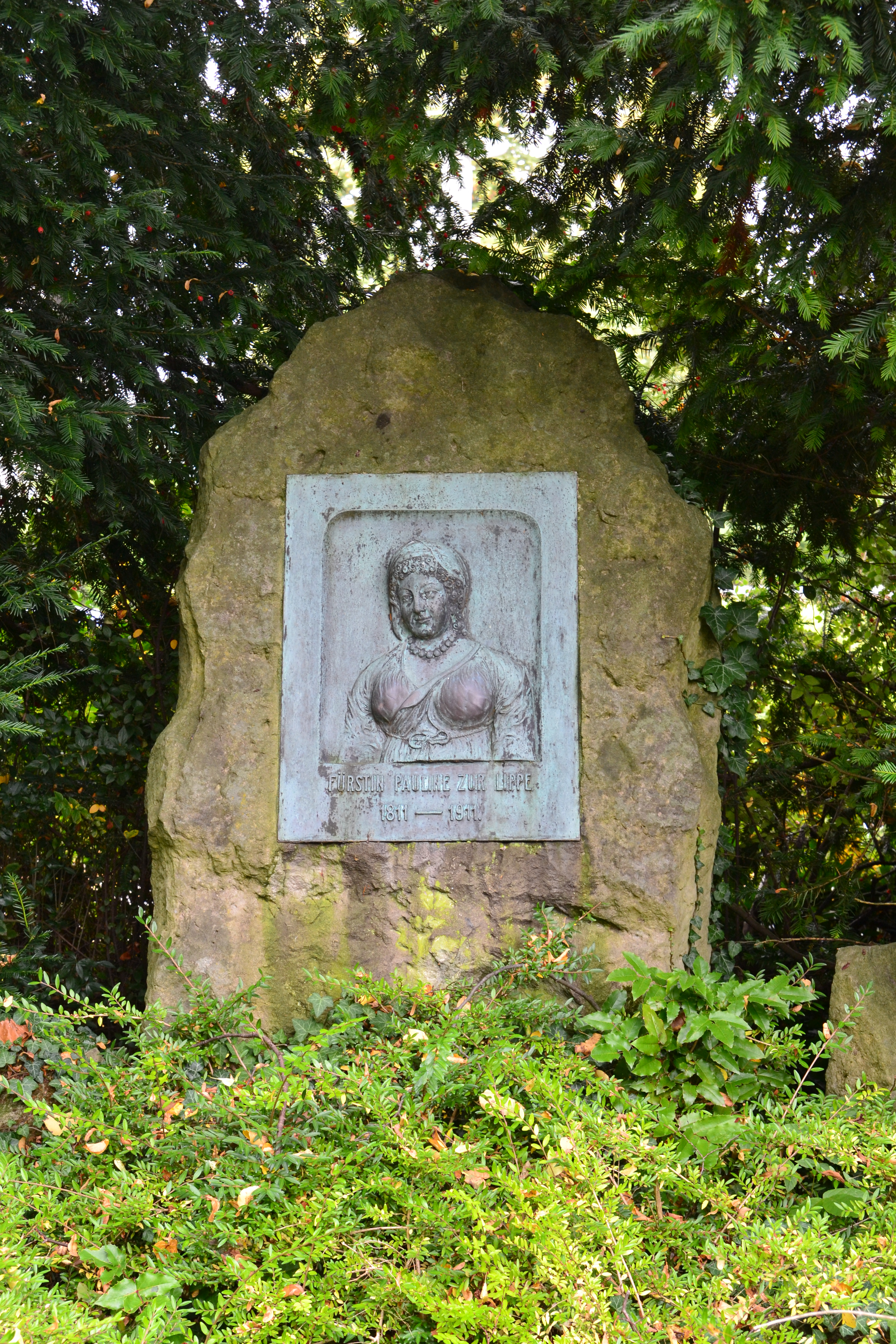 Gedenkstein- und Tafel für Fürstin Pauline zur Lippe am Lindenhaus in Lemgo/Brake